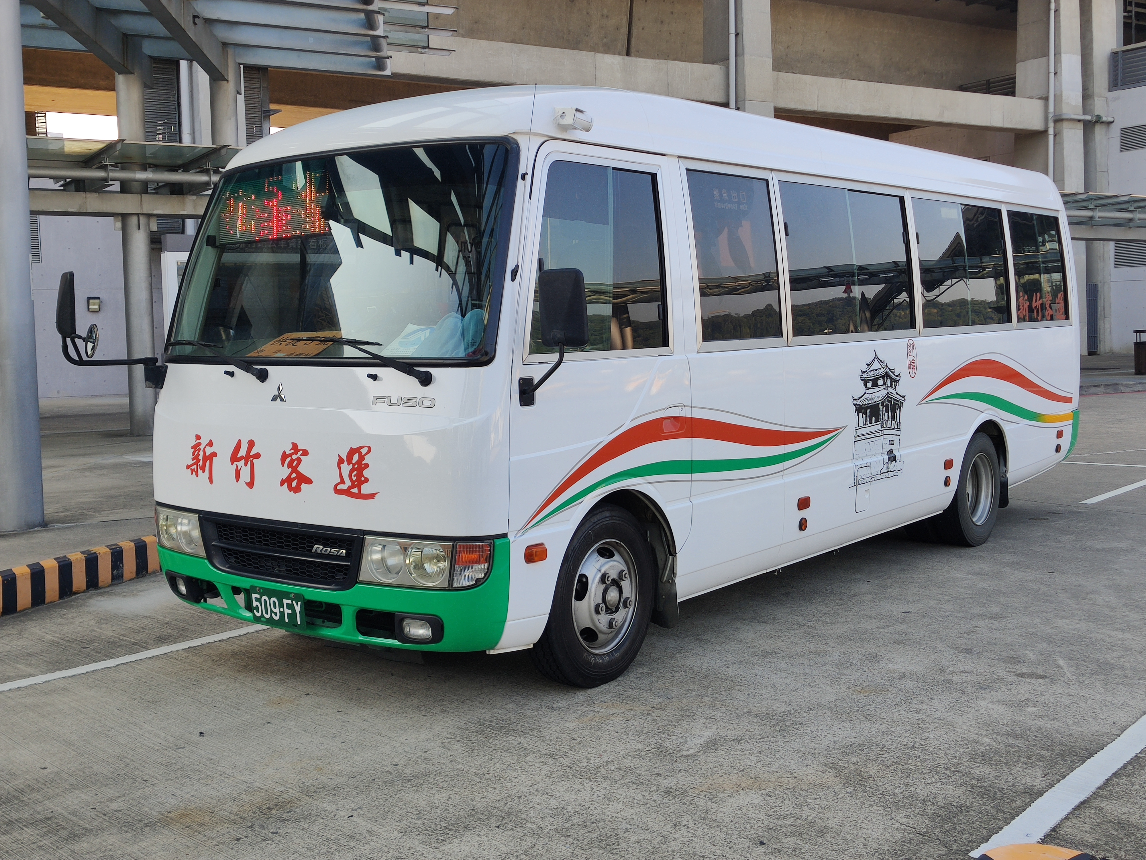 新竹客運 三菱ROSA大客車 509-FY